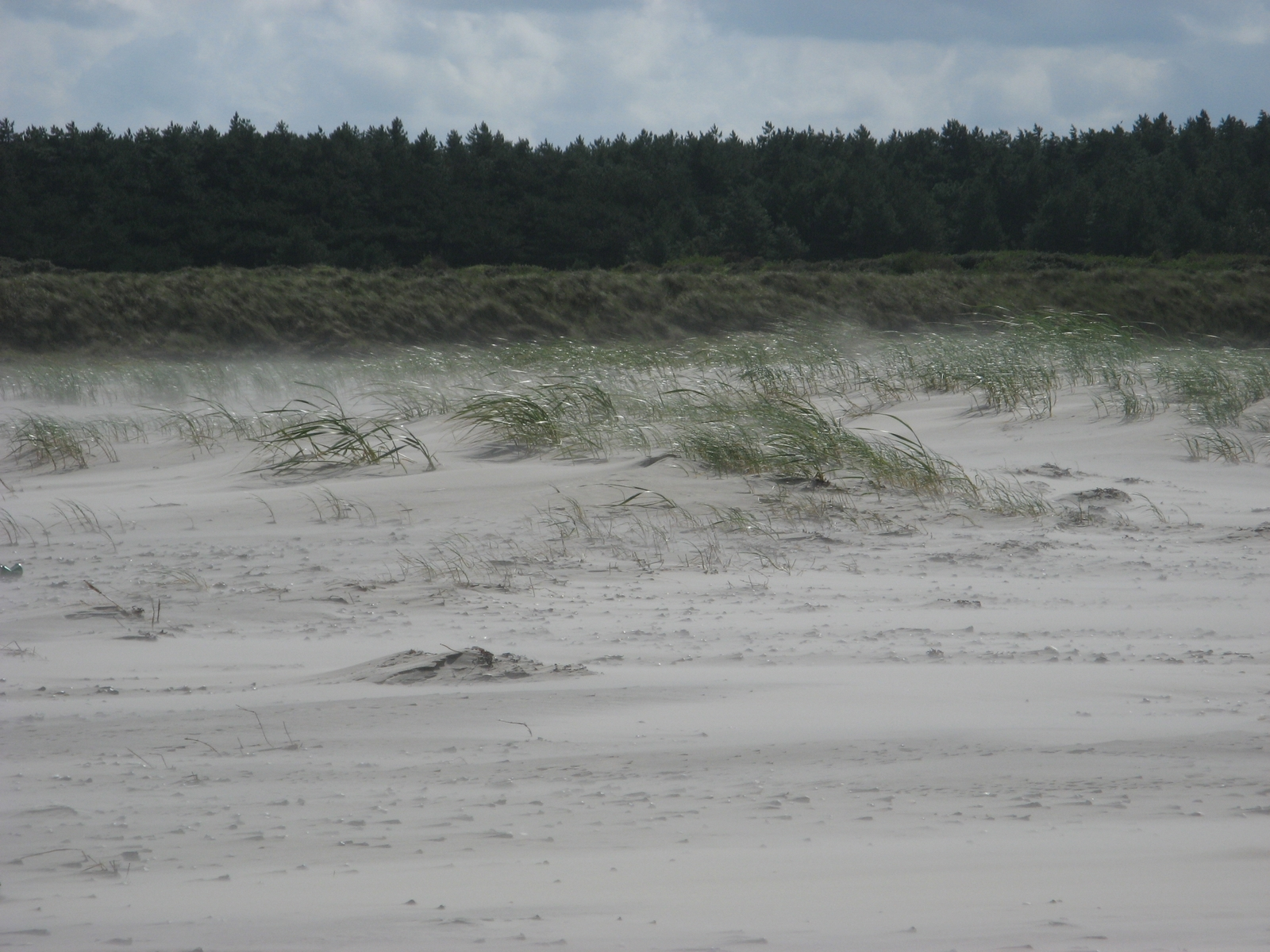 Schiermonnikoog